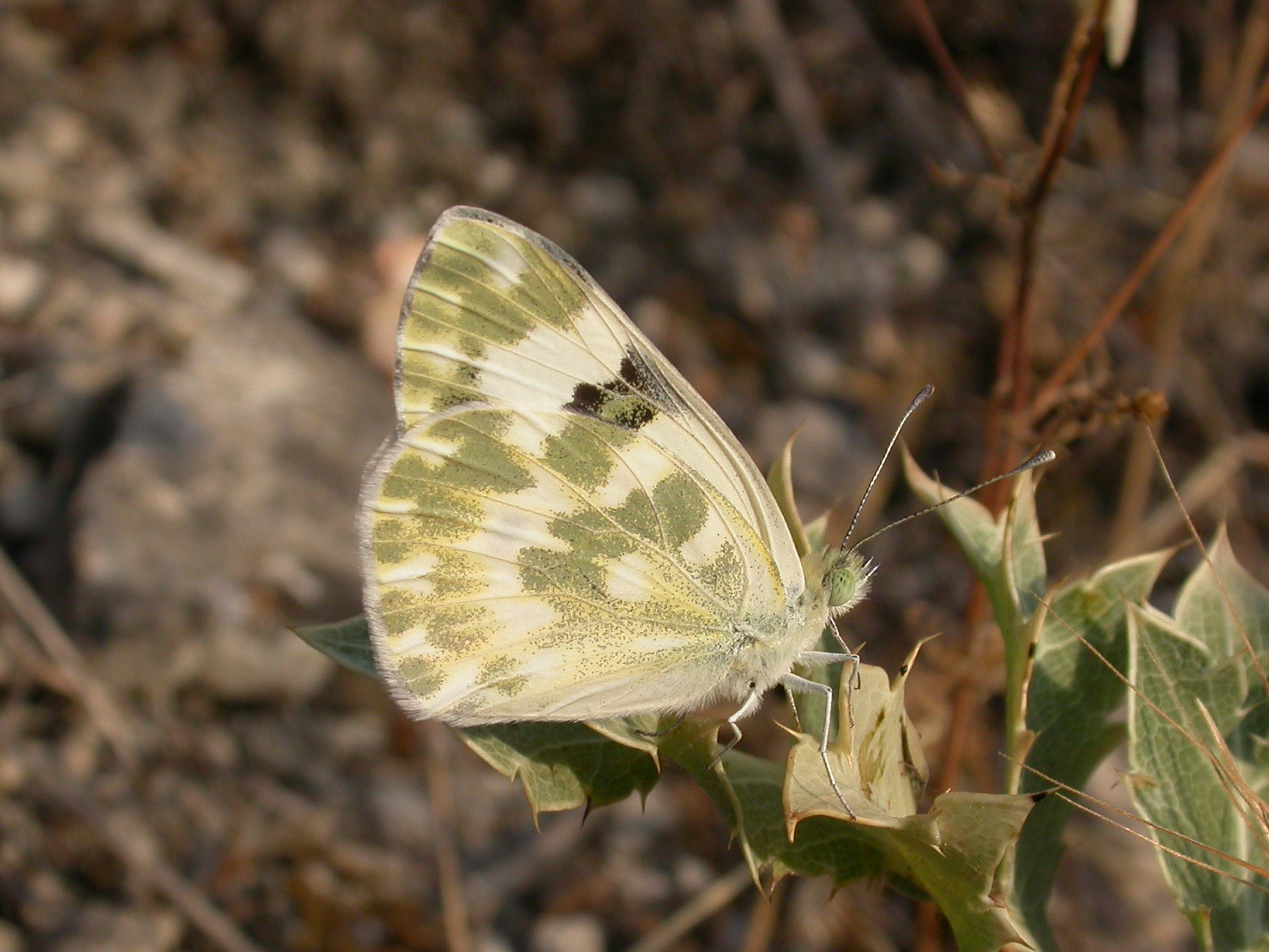 Pontia dalplidice (Pieridae). Rivas Vaciamadrid, Madrid, España.